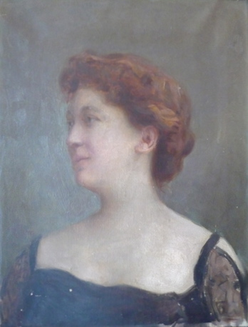 Portrait de Madame Henri-Robert, née Suzanne Level (1869-1903)